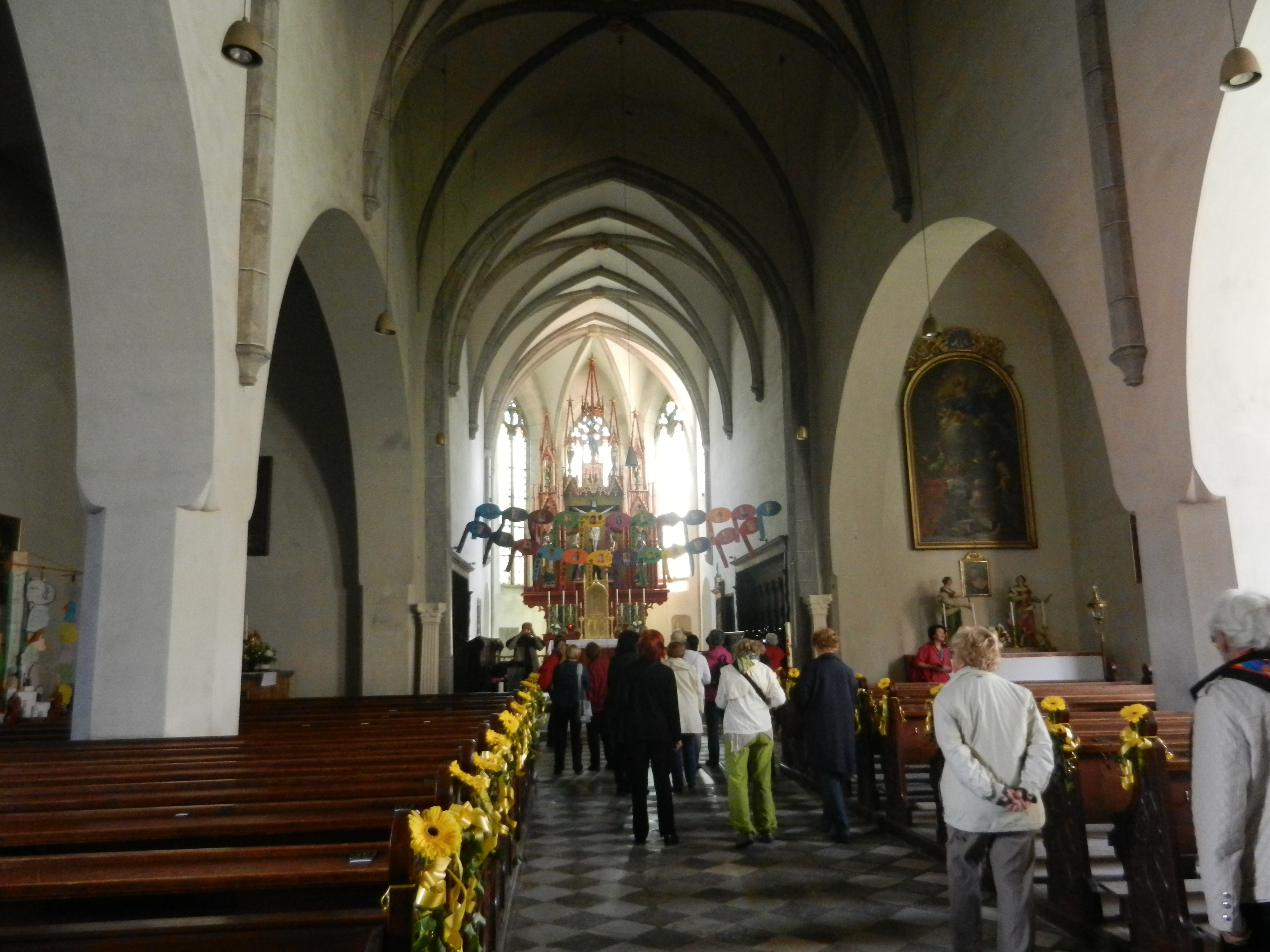 Župnijska cerkev sv. Andreja, Šentandraž v Labotski dolini, notranjost.